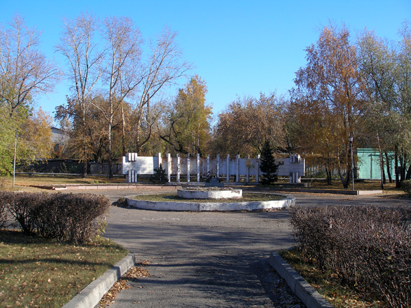 Площадь Свободы. Барнаул